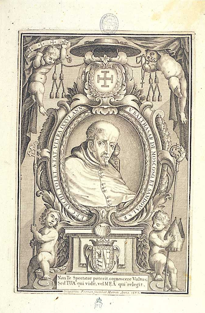 Kardinal Baltasar Moscoso y Sandoval (1589-1665), Bischof von Jaén und Erzbischof von Toledo